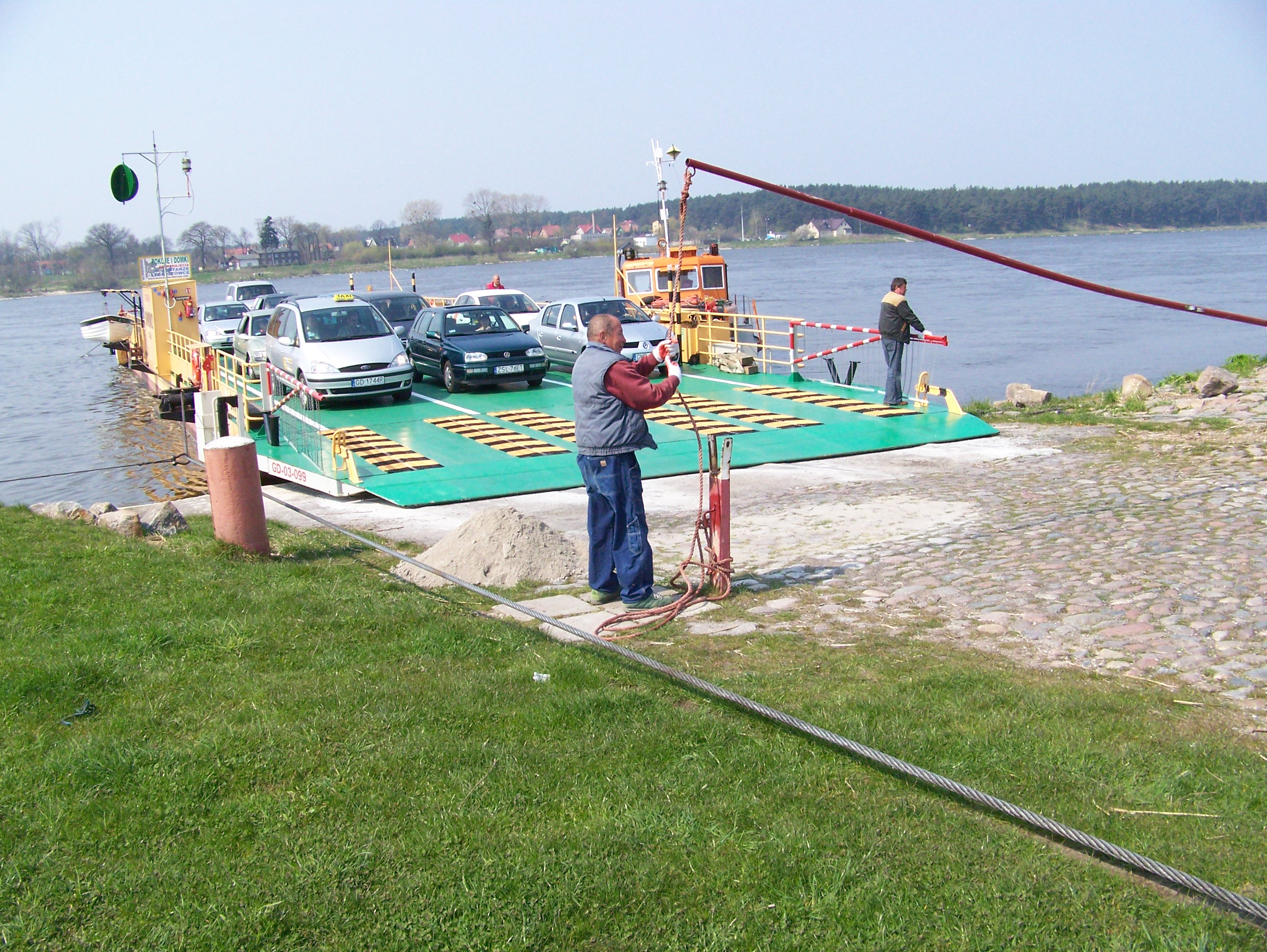 Prom w Mikoszewie